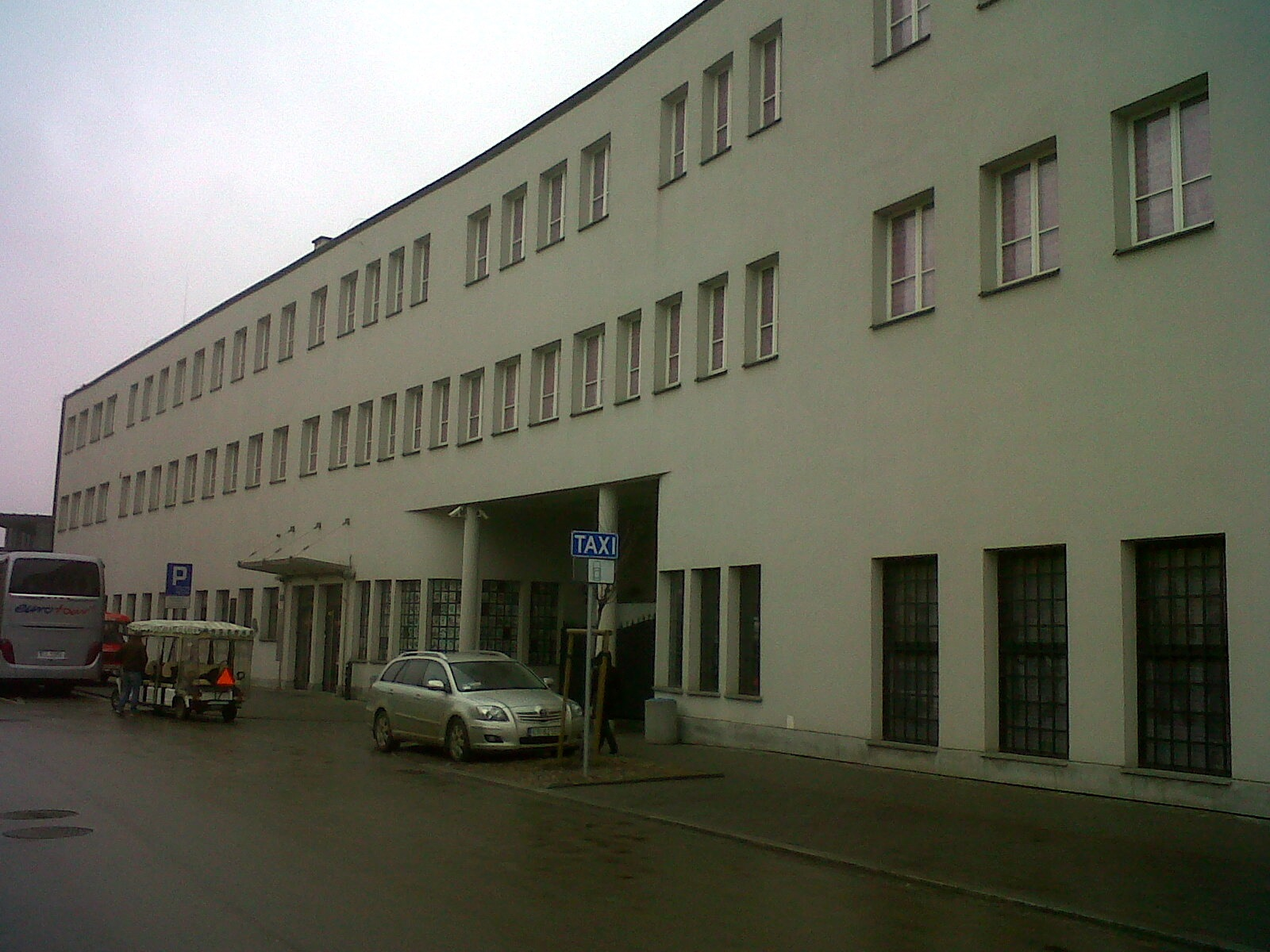 Façade de la Deutsch Emailwaren Fabrik d'Oskar Schindler à Cracovie en 2012.